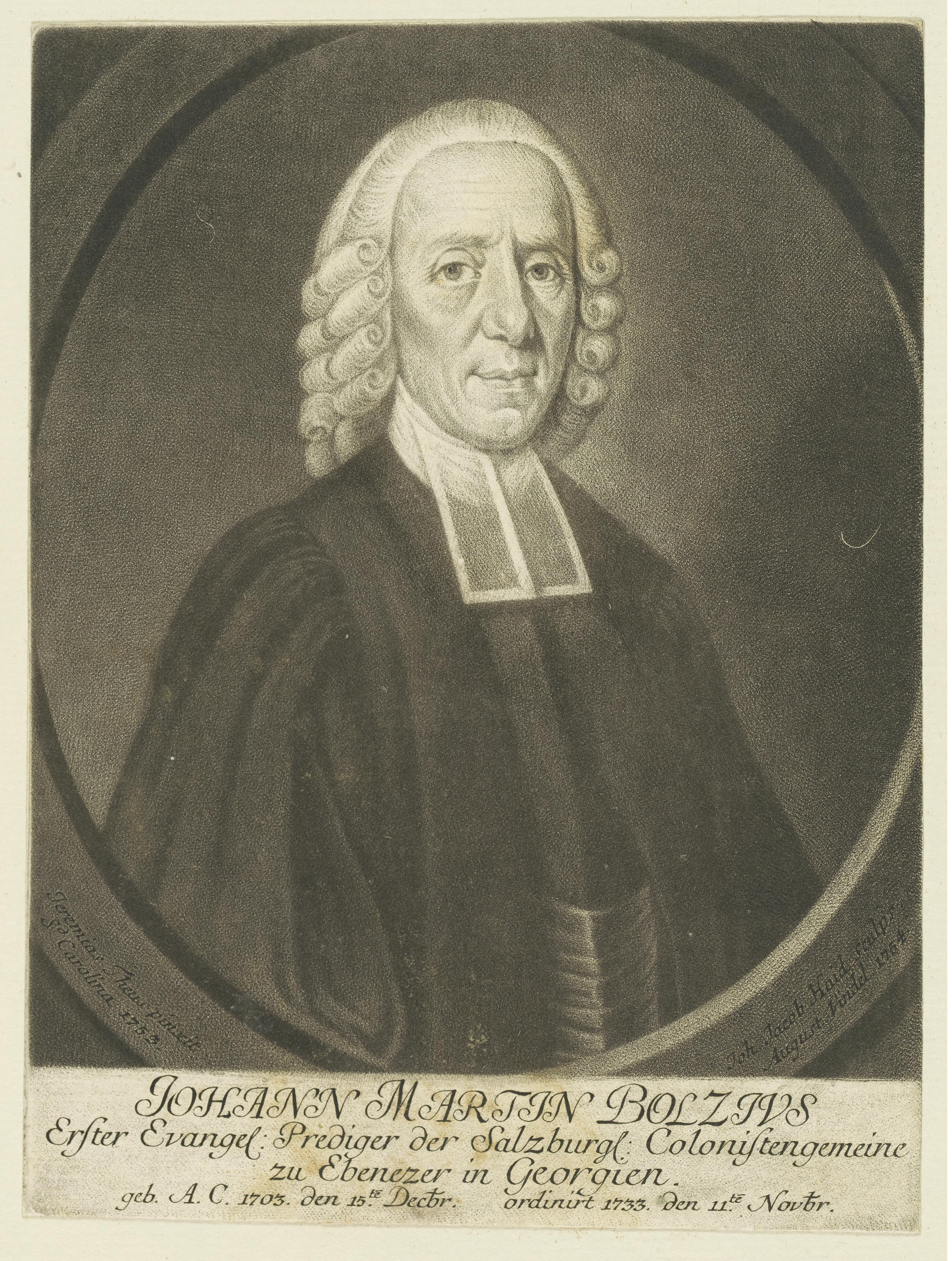 Bildnis des Johann Martin Bolzivs Schabkunst, 16.6 x 12.3 cm (Blatt) Leipzig, Universitätsbibliothek Leipzig, Porträtstichsammlung, Inventar-Nr. IIIBI, 67